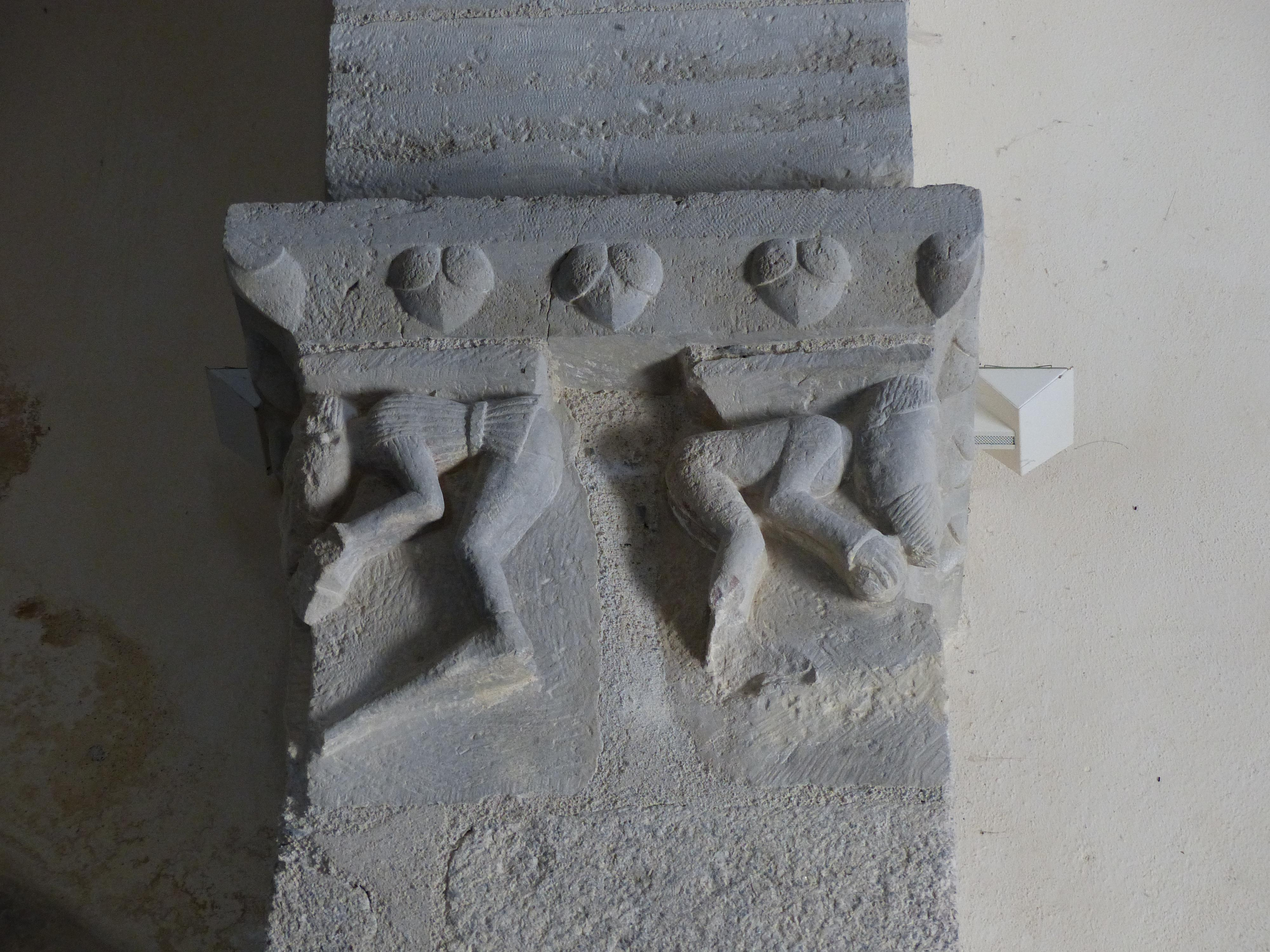 Chirat-l'Église (Allier, France). Église. Chapiteau de pilastre à droite en entrant (sud).